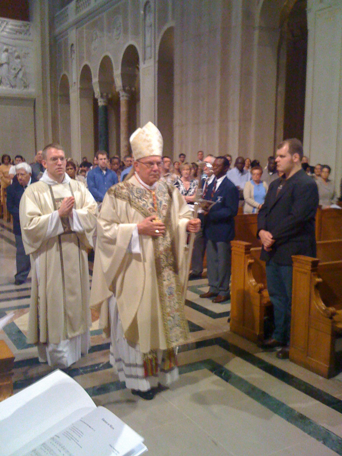 Son éminence le cardinal William Joseph Levada dans la procession pour la consécration épiscopale de Mgr DiNoia's